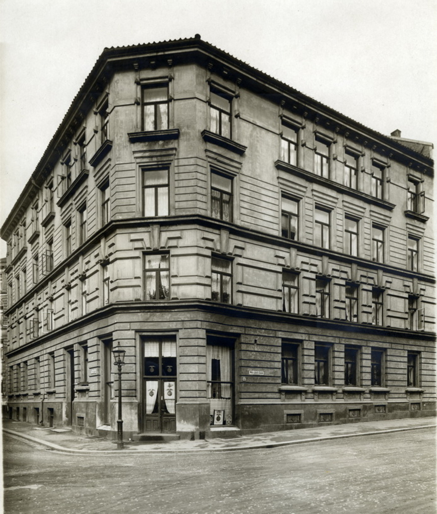 Tidligere bygning i Niels Juels gate 6. Foto: Narve Skarpmoen (1922)/ Oslo byarkiv. BYgget ble trolig revet etter Fillipstadulykken.